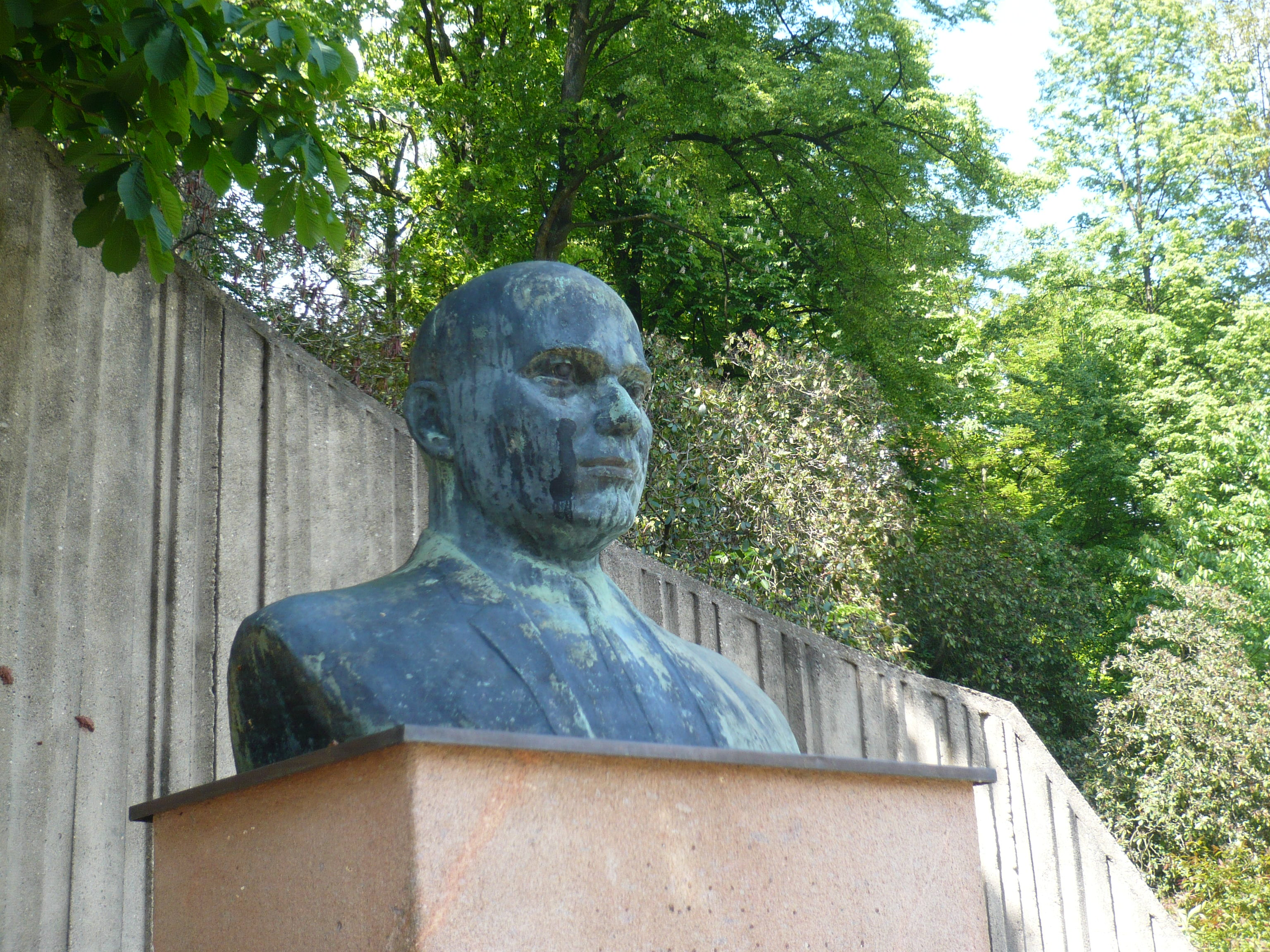 Stadt Aue, Thälmann-Büste im Stadtgarten